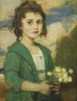 Frühling